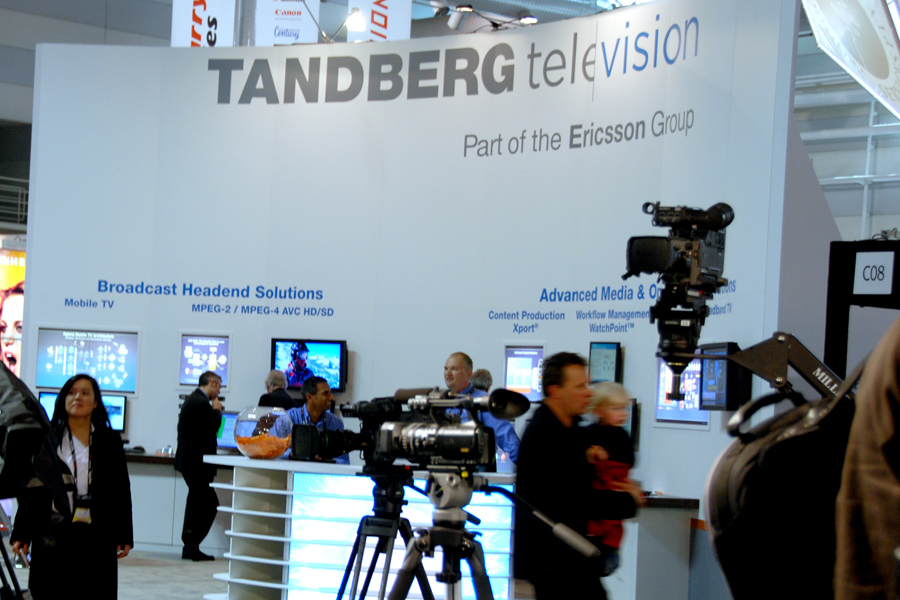 Tandberg Television